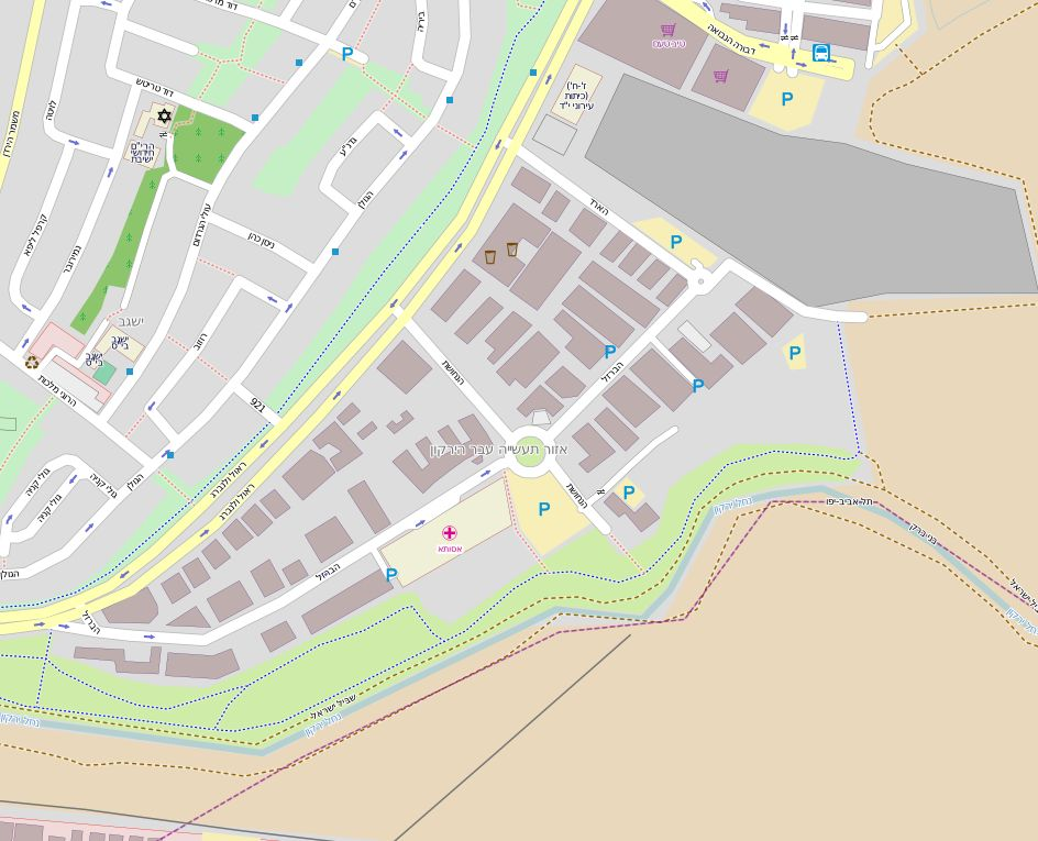 Strefa przemysłowa Jarkon, Tel Aviv